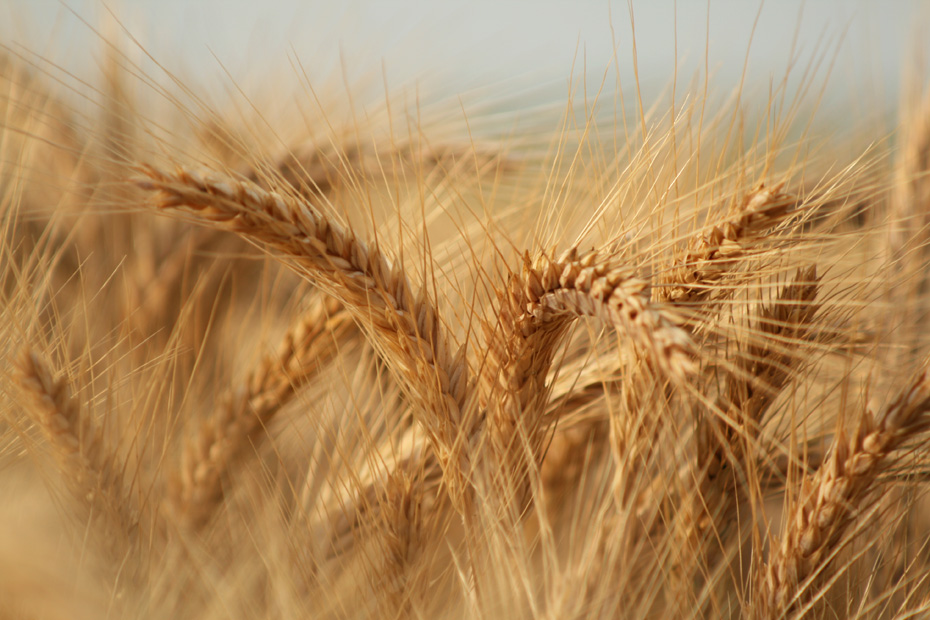 Epi de triticale mature